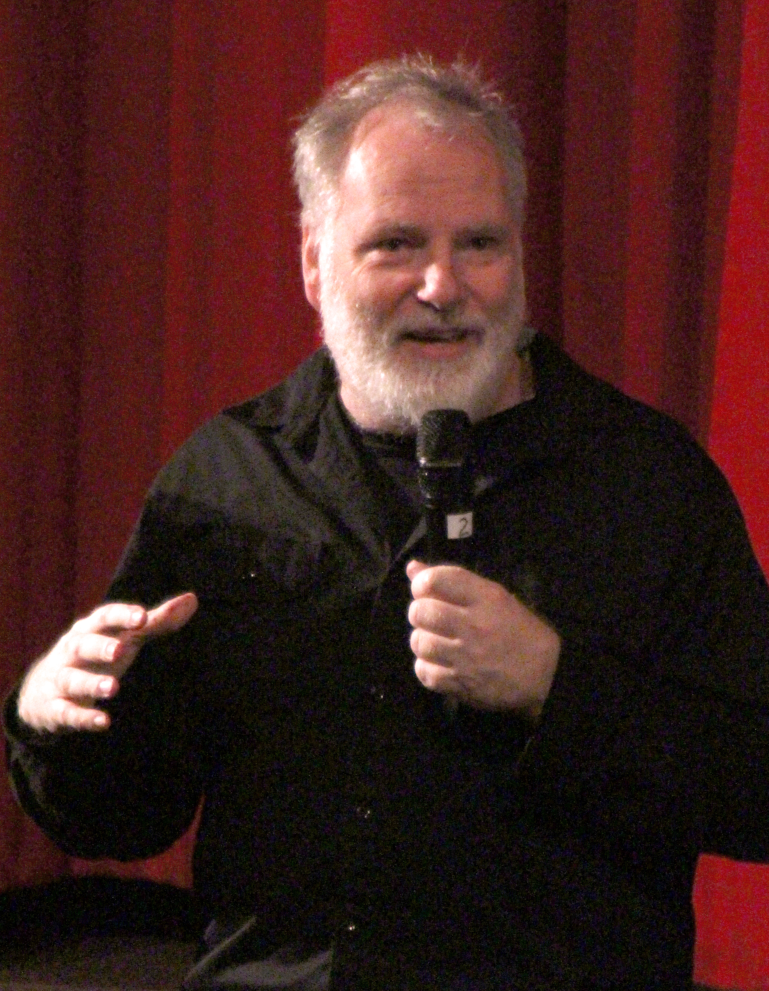 Guy Maddin bei der Premiere seines Films The Forbidden Room bei der Berlinale 2015